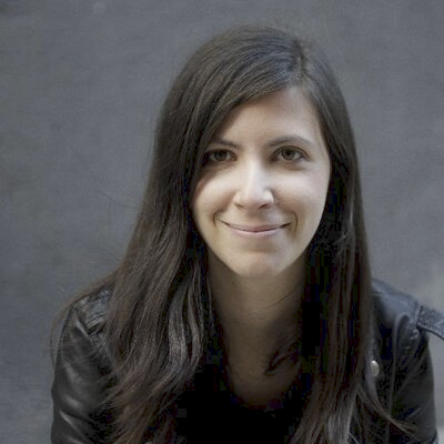 Ana Requena en el microsite lanzado con motivo del segundo aniversario de eldiario.es